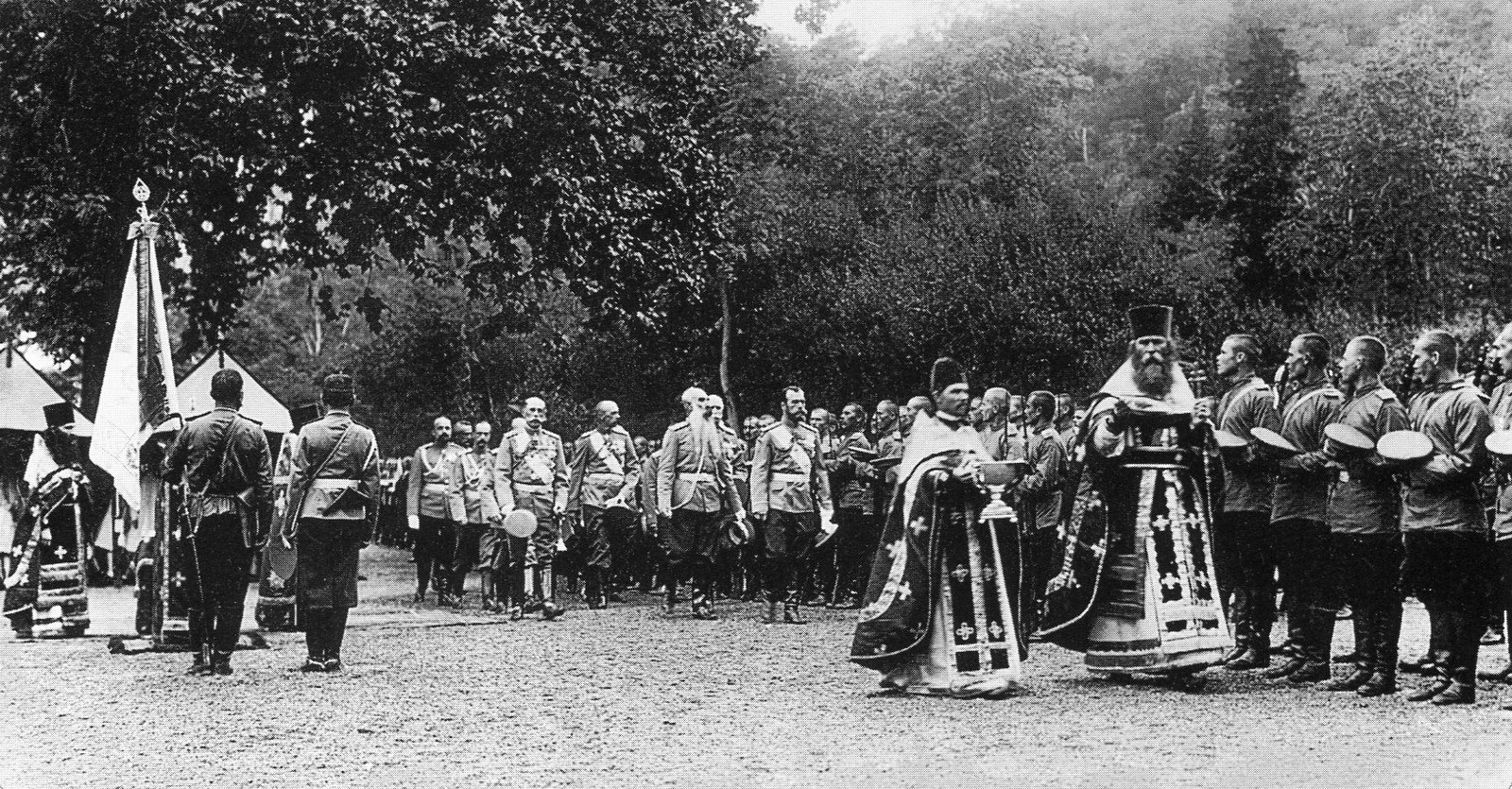 Кропление святой водой офицеров и солдат Петергофского гарнизона после молебна в присутствии Императора Николая II.